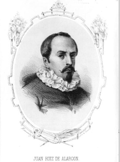 Grabado de Juan Ruiz de Alarcón. Fuente: Gallo, Eduardo I. Hombres ilustres mexicanos, t. II. México: Imprenta de Ignacio Cumplido, 1871, p. 283.